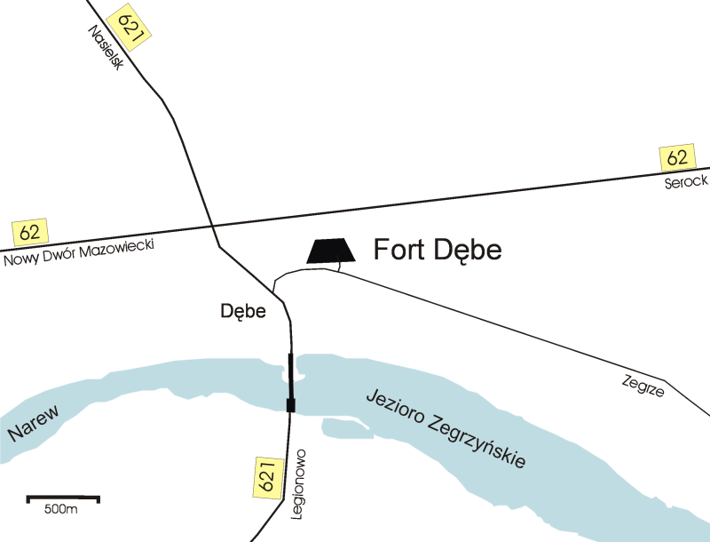 Schemat przedstawiający położenie Fortu Dębe. Autor: Zbigniew Strucki.